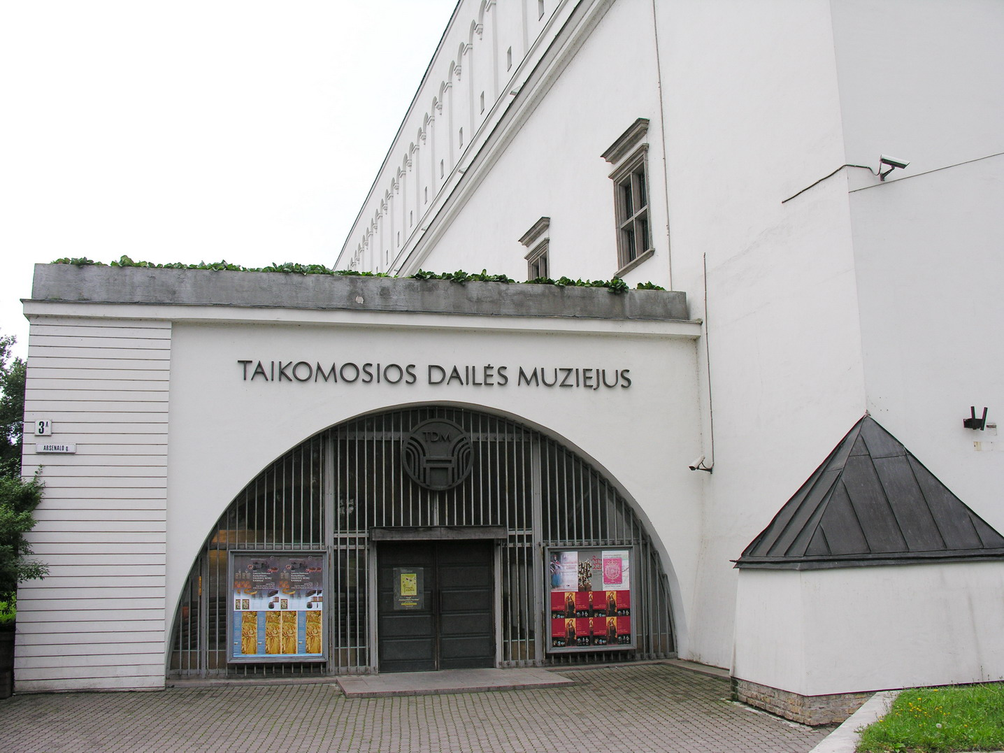 Taikomosios dailės muziejus Foto: Algirdas, 2006 m. rugpjūčio 8 d., Lietuva